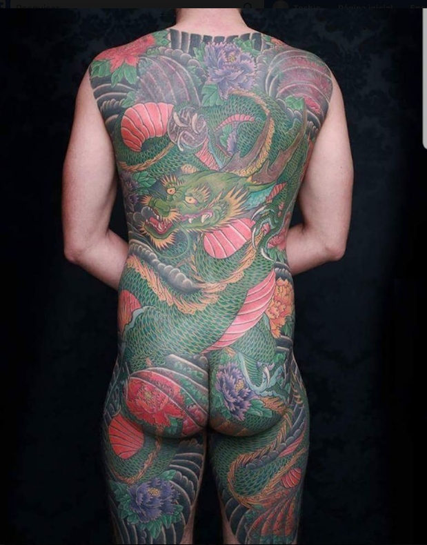 Tatuagem no estilo Japonês